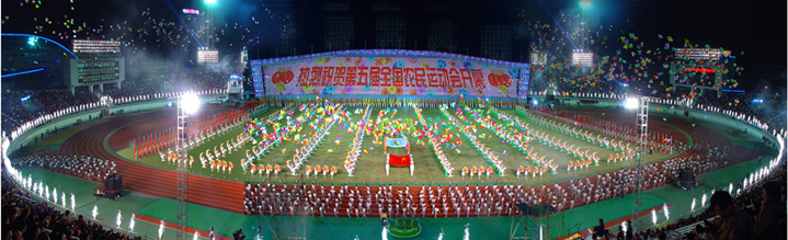 中华人民共和国第五届全国农民运动会开幕式